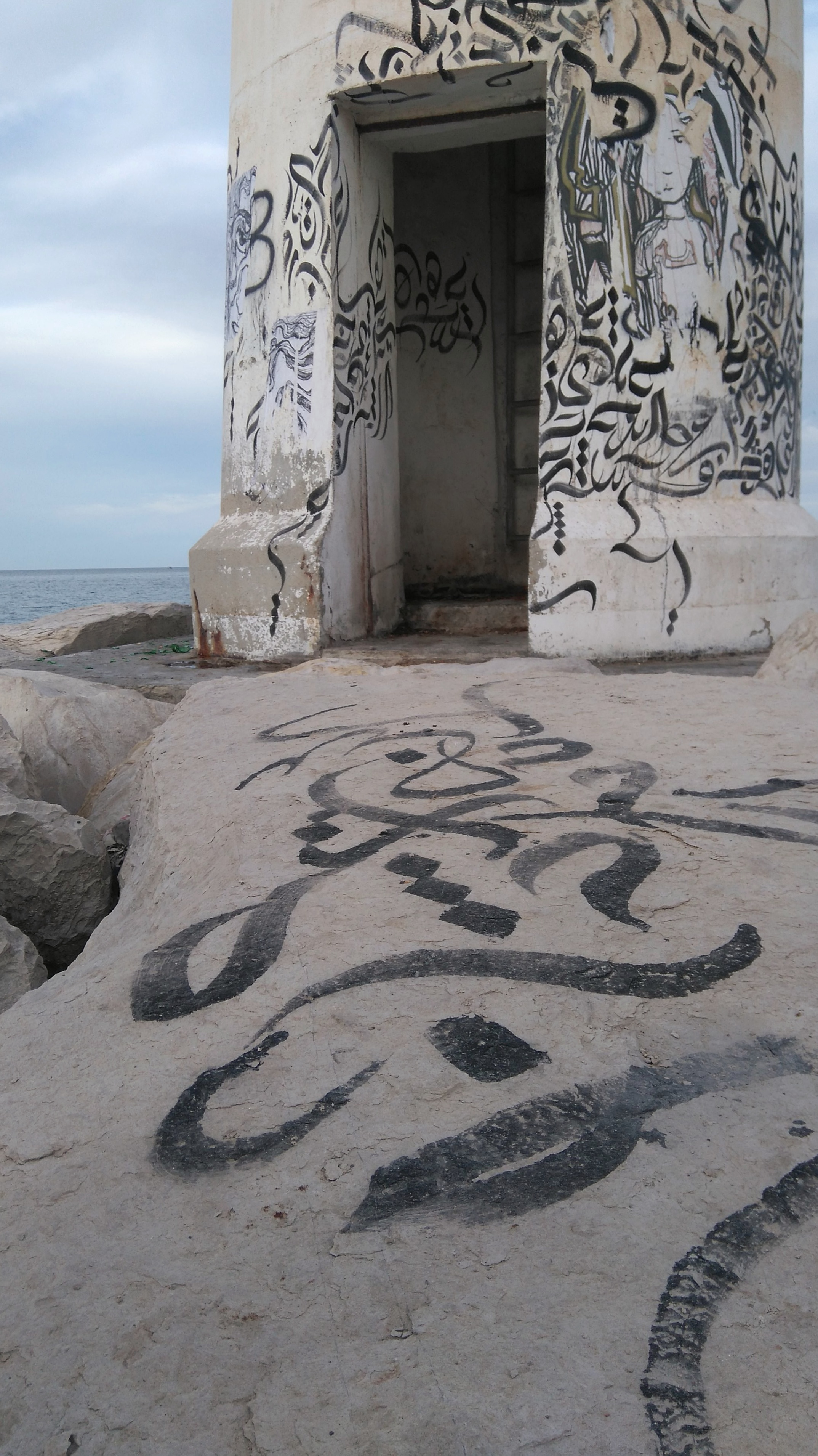 Vue du port de pêche de la ville de SAYADA, Tunisie